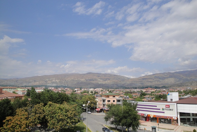 Erzincan panorama merkez, 2011.